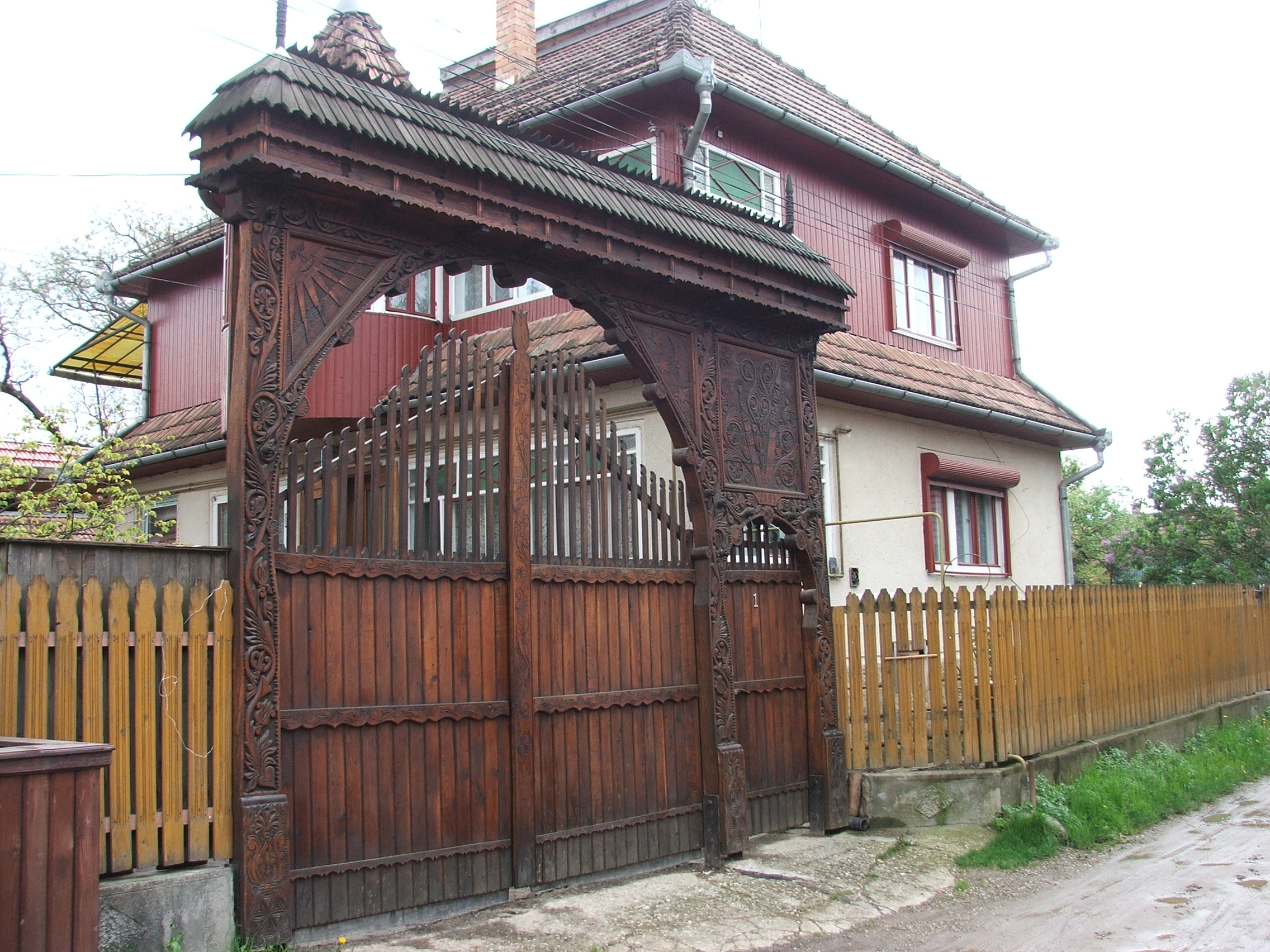 Covasna, poartă secuiască.